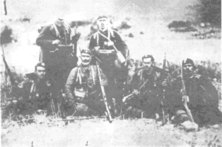 Blazhe Bozhinov i Silko Tsvetkov cheta